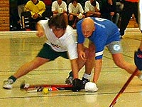 Spielszene Hallenhockey Regionalliga 02/03 HC Essen 99 - TSC Eintracht Dortmund